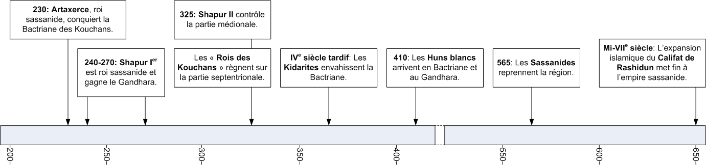 Ligne du temps marquant les nations régnant sur la partie extrême-orientale de l'empire sassanide (Gandhara et Bactriane).